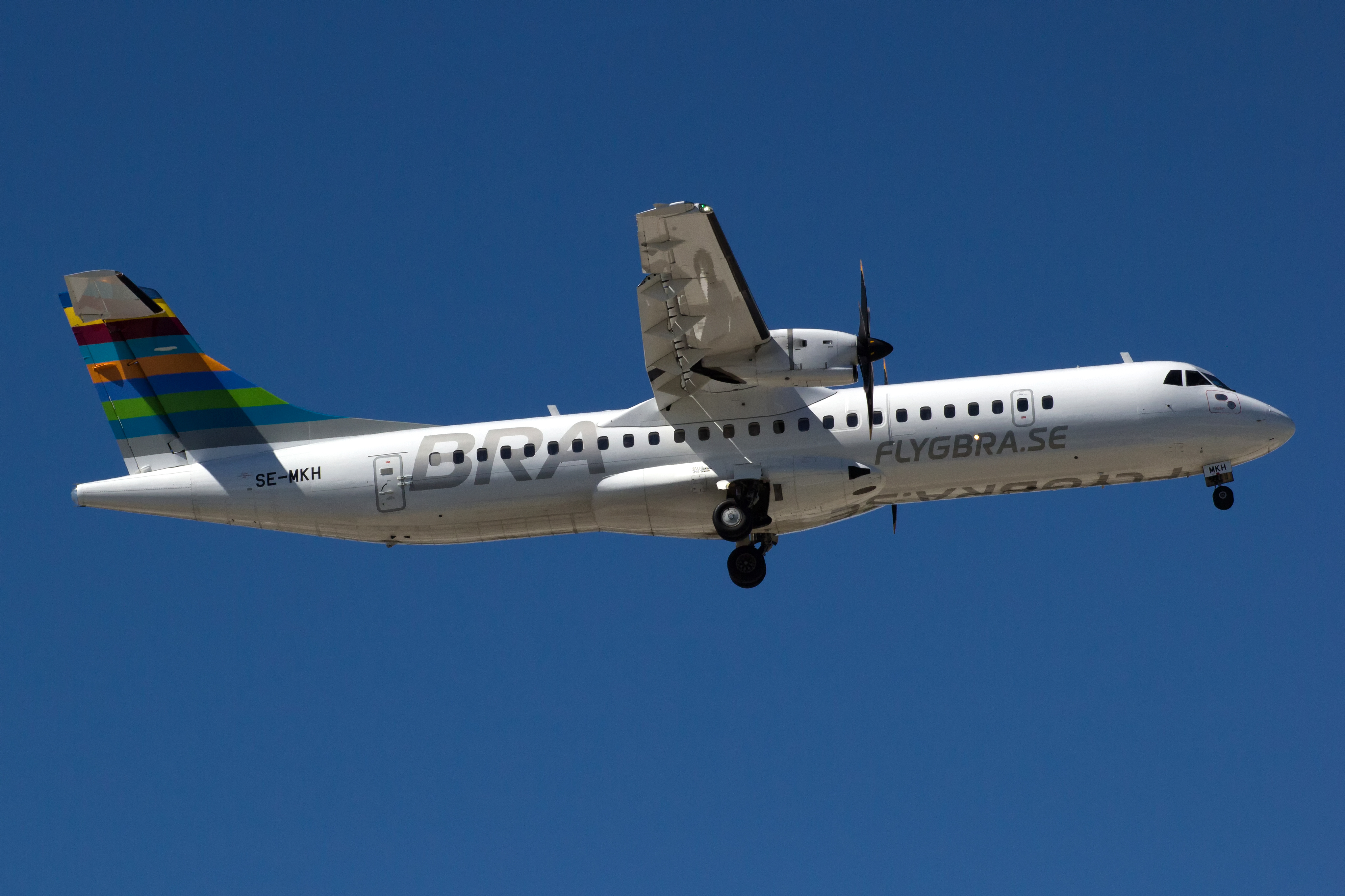 ATR 72 de BRA aterrando no aeroporto de Visby.